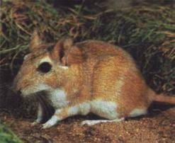 Ավազամուկ